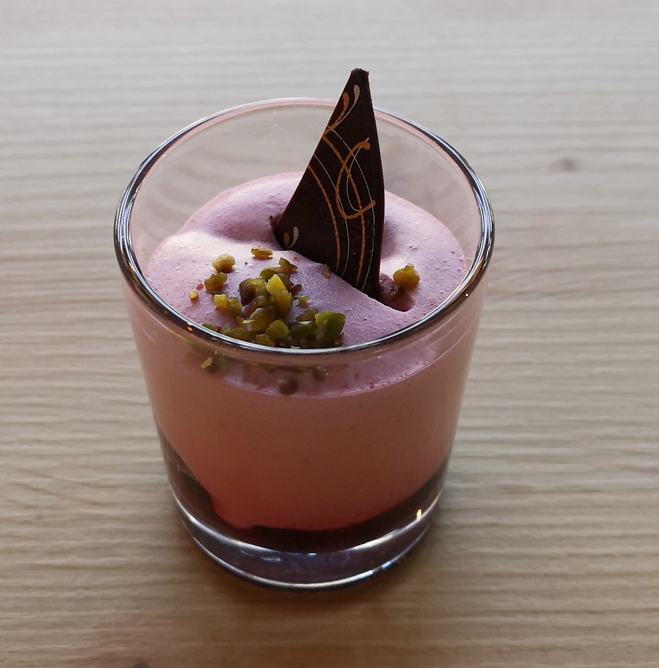 Dessert als Convenience Food bei der Metro AG